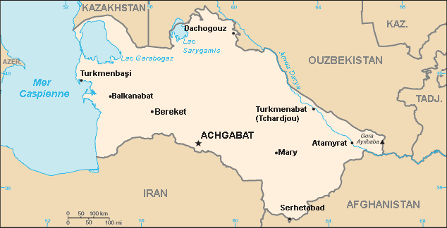 Turkmenistan Map in french - Carte du Turkménistan